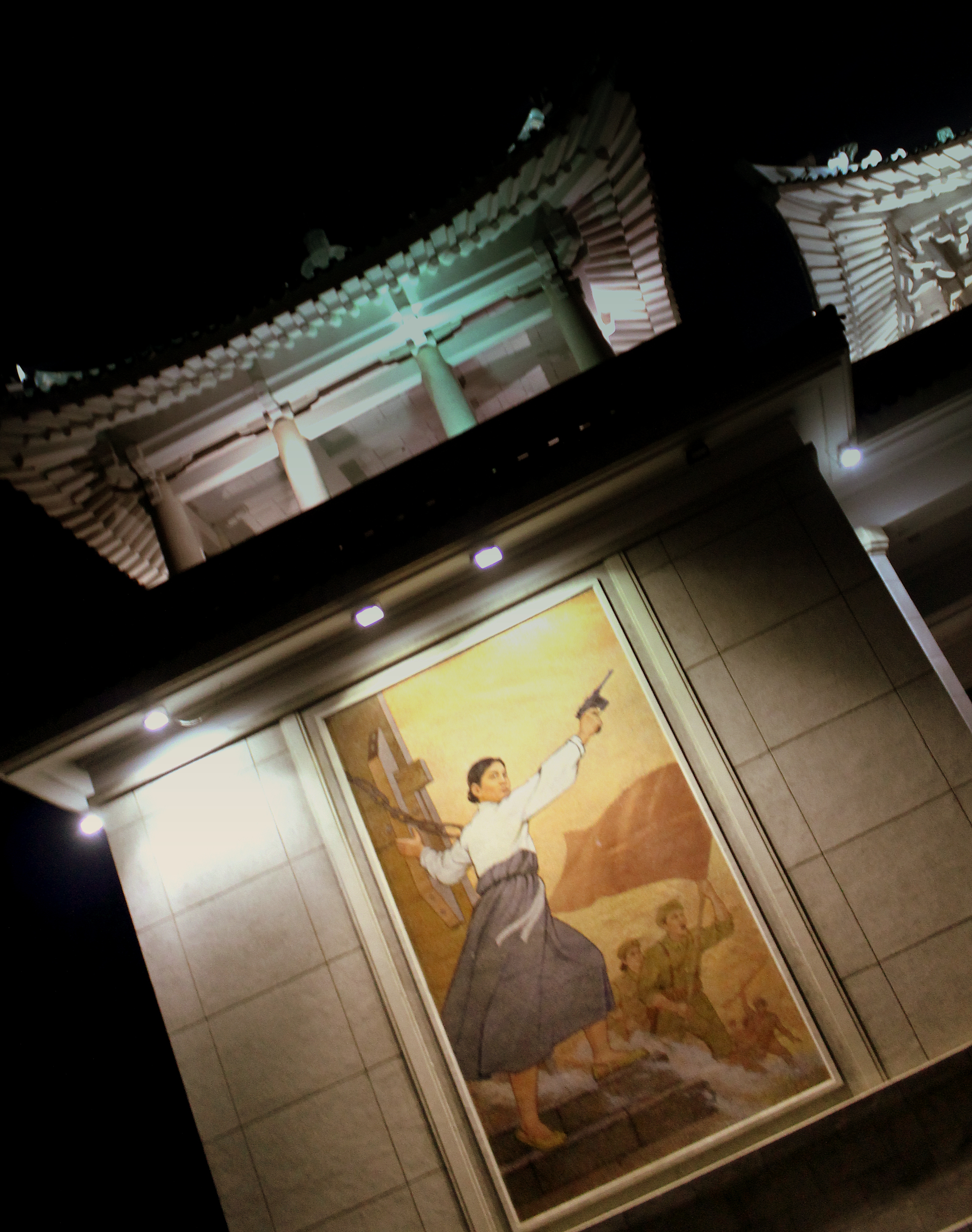 PYONGYANG CITY DPRK NORTH KOREA OCT 2012